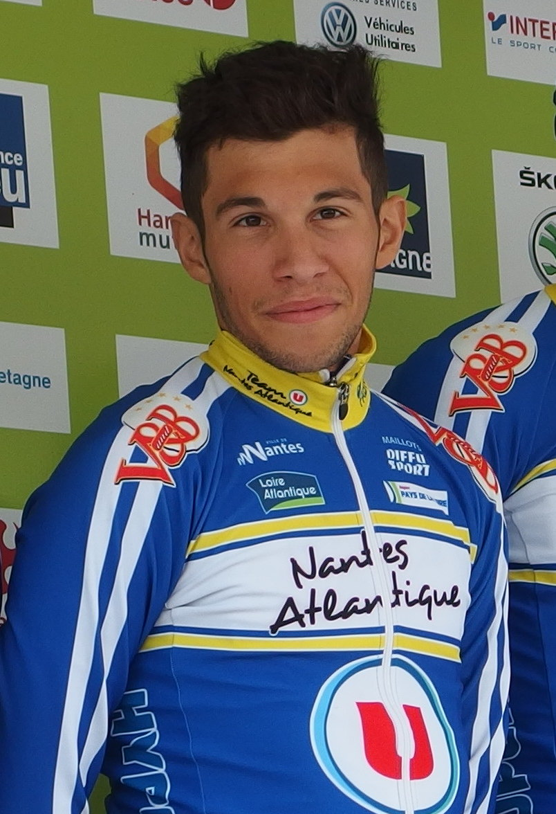 Tour de Bretagne 2015 - Présentation des équipes au départ de la troisième étape à Baud - Équipe UC Nantes Atlantique Depicted person: Thibault Ferasse